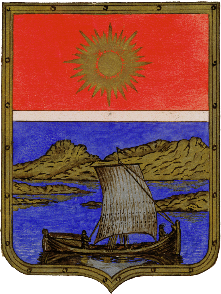 Det gamle kommunevåpenet til Bodø kommune, som var i bruk 1889 til 1959.